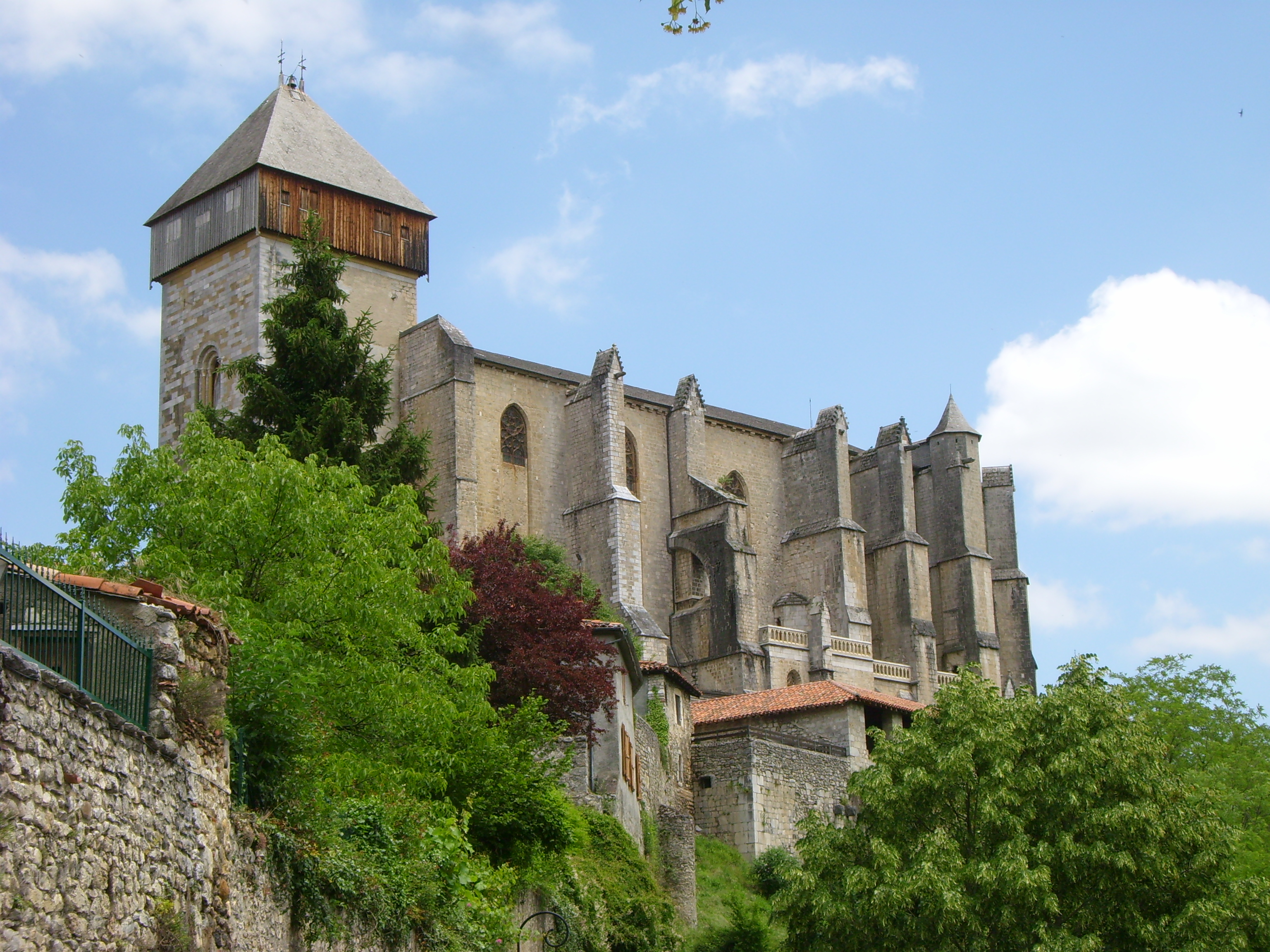 Façade sud de la cathédrale de Saint-Bertrand-de-Comminges